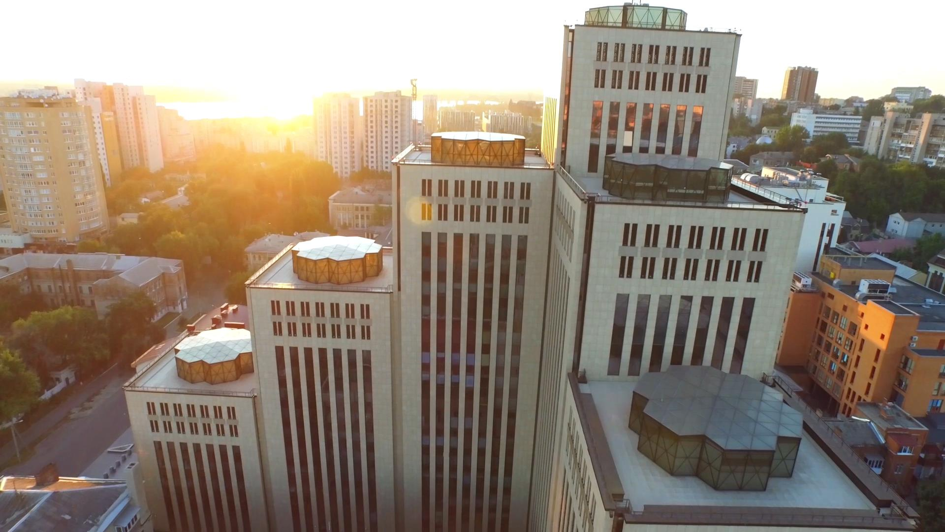 Общий вид на центр «Менора», ул. Шолом-Алейхема, 4/26, г. Днепр, Днепропетровская область, Украина